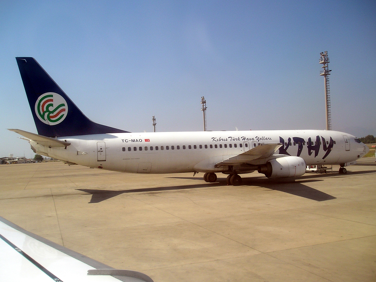 Kibris Turk Hava Yollari Boeing 737-800